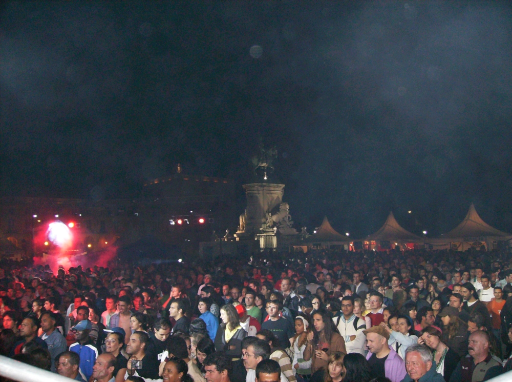 Arraial Pride 2007, vista parcial do recinto